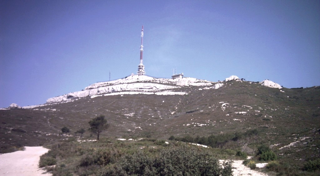 L'émetteur de télévision de l'Étoile, vu depuis le chemin de Palama (face sud).